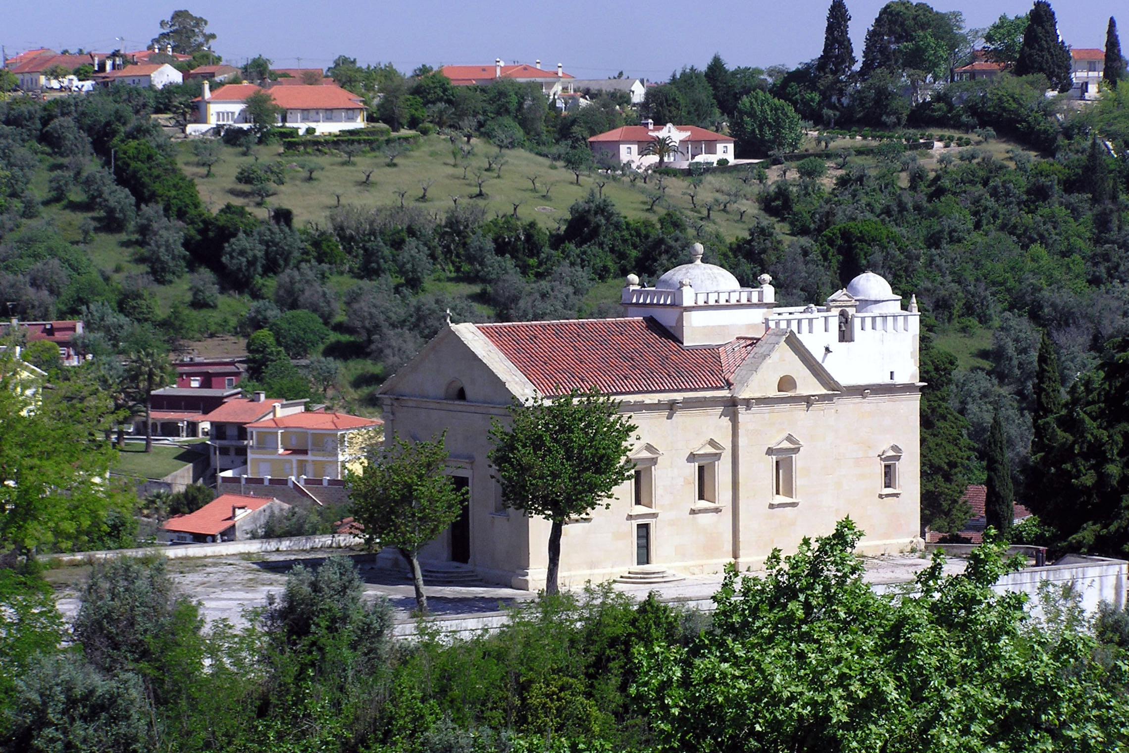 Chapel of Our Lady of the Conception (Nossa Senhora da Conceição) - Tomar